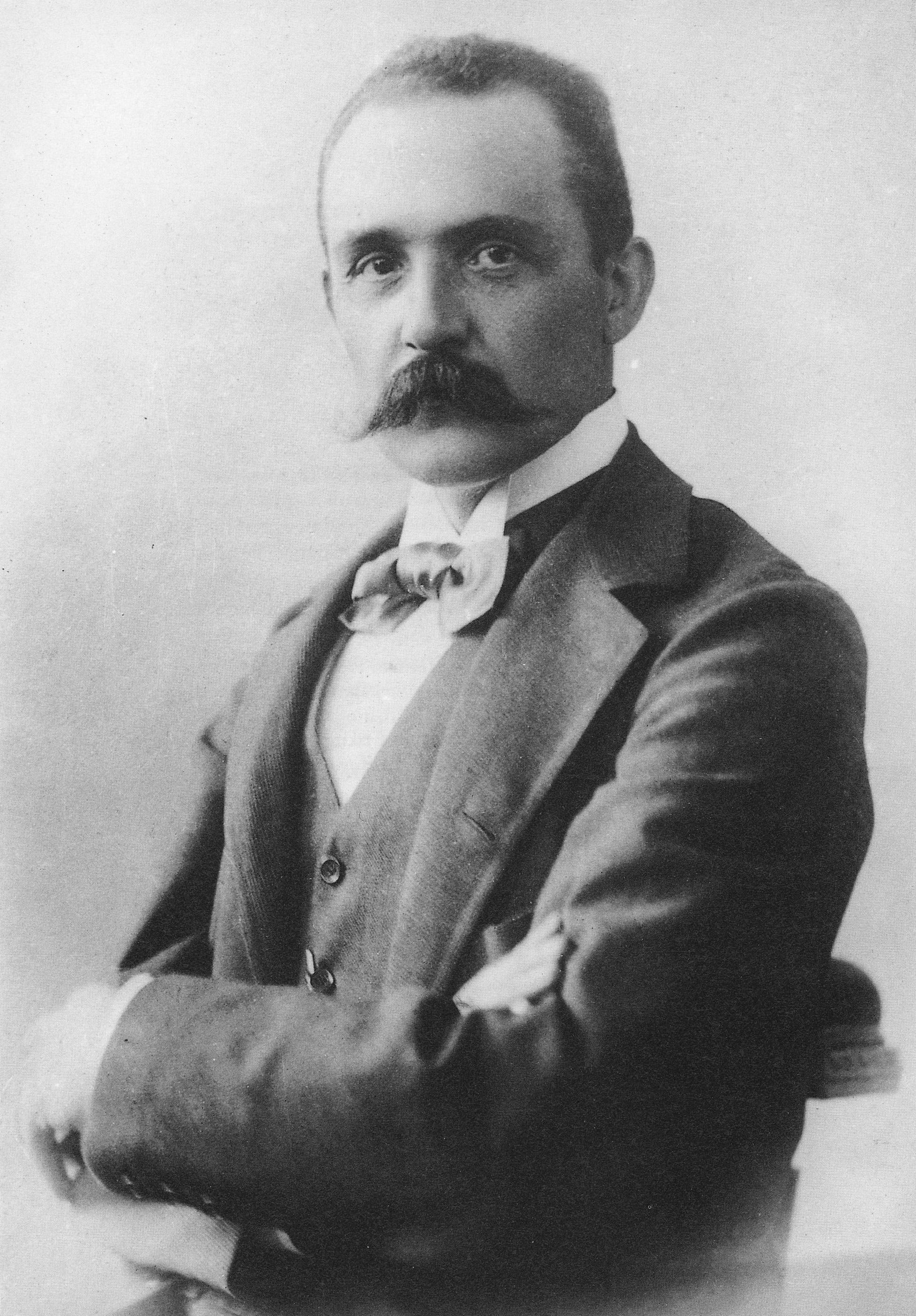 Ritratto di Raimondo D'Aronco.